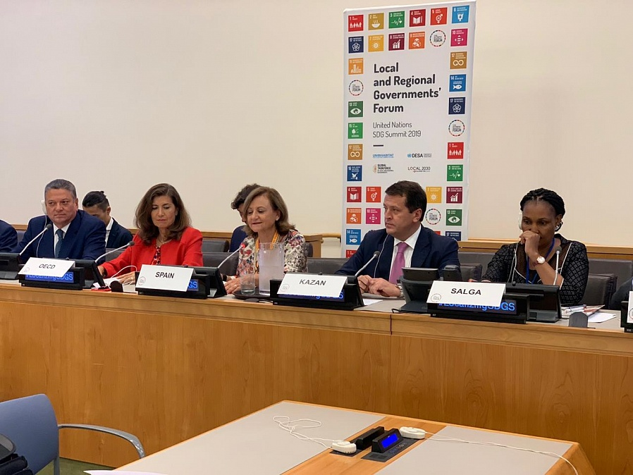 Татарча/tatarça: Topic: Localizing SDGs. For more